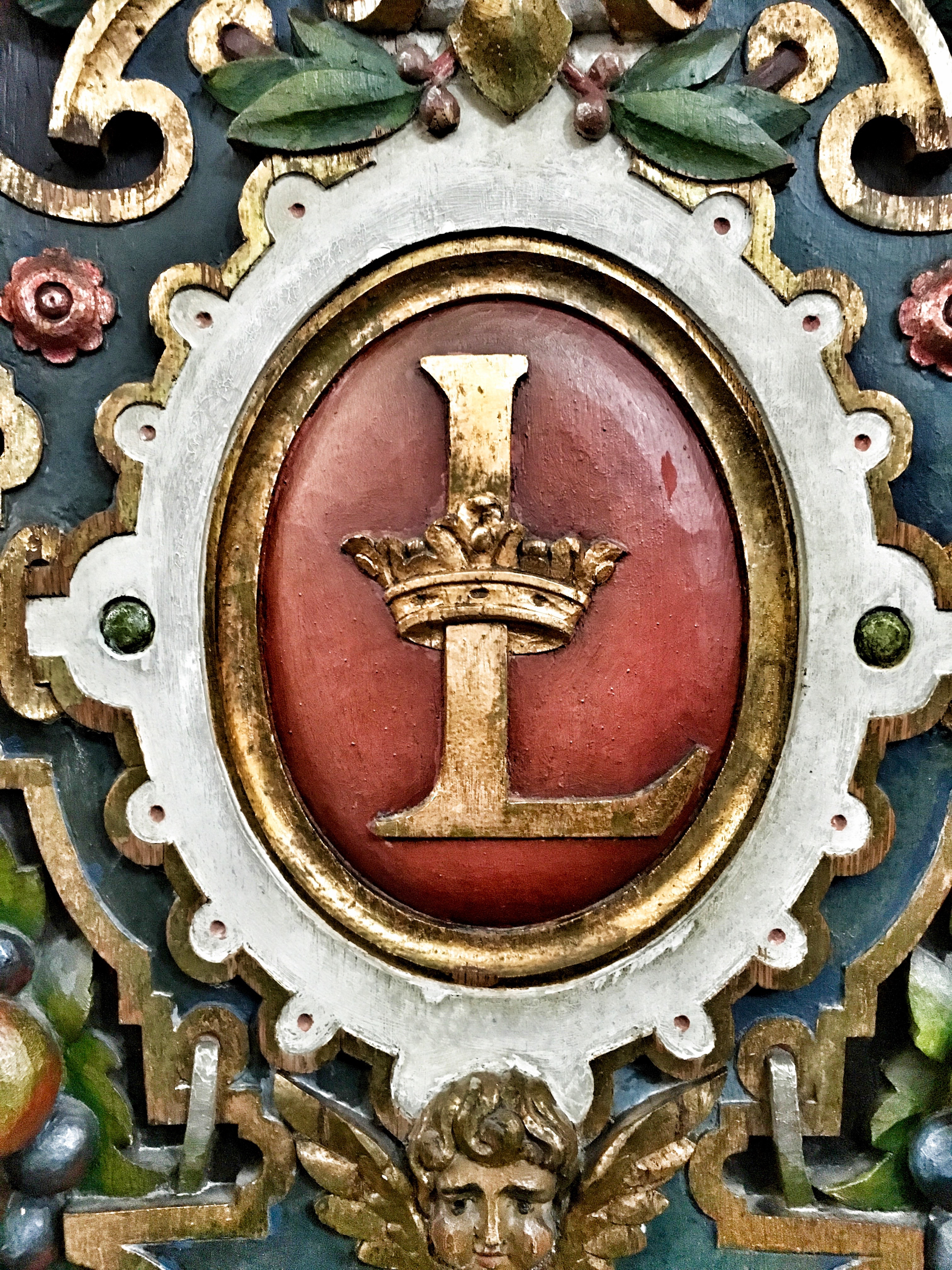 Louise af Hessen-Kassels monogram, Helligaandskirken, København